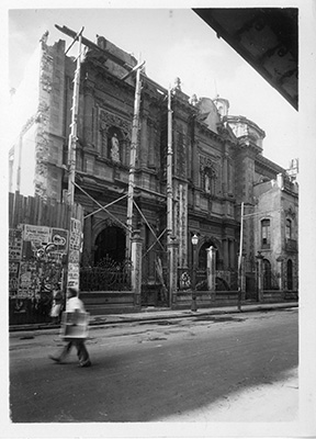 Fotografía antigua de la Ciudad de México resguardadas por el Museo Archivo de la Fotografía (MAF) de la Ciudad de México.